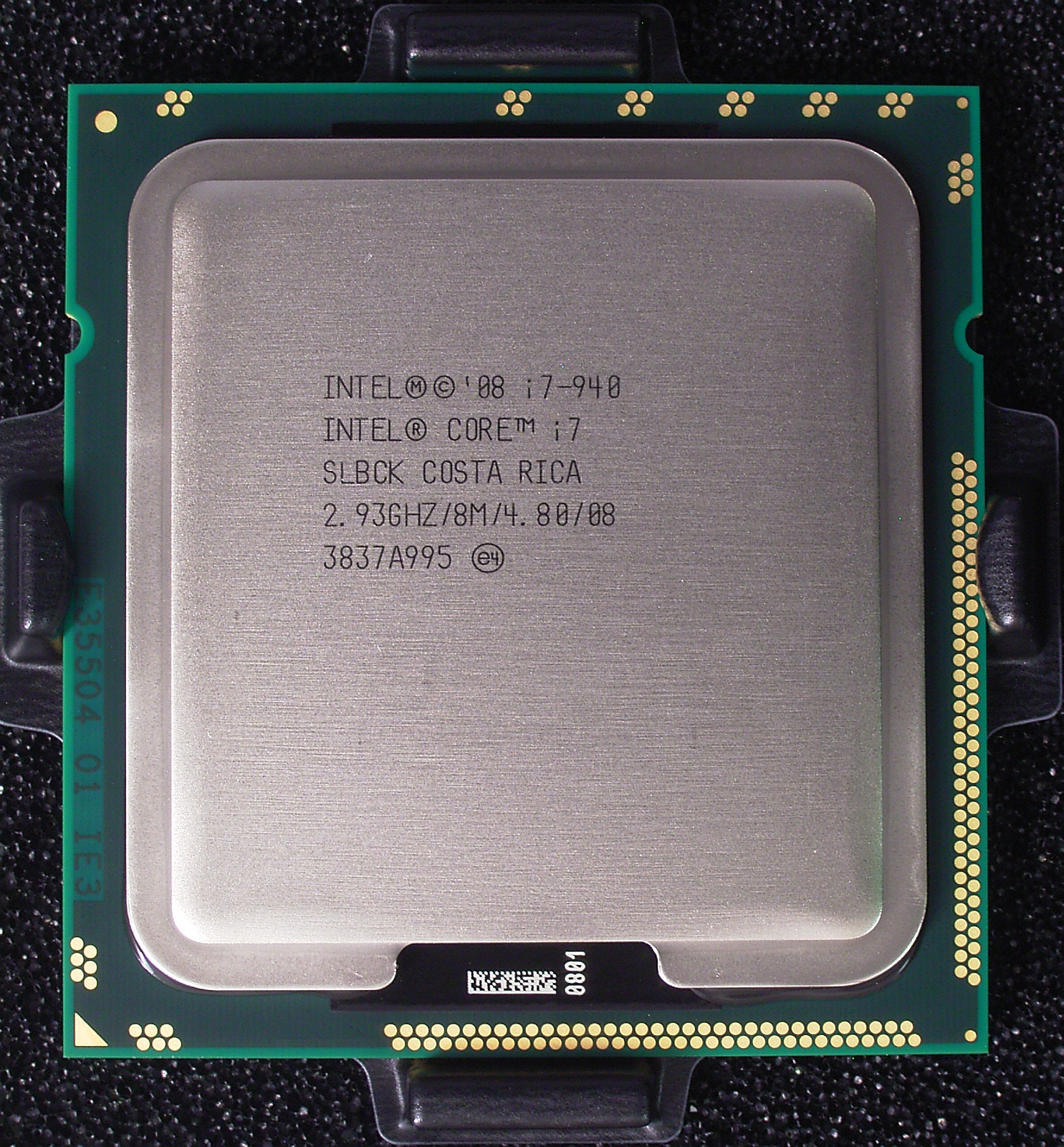 Oberseite eines Intel core i7-940, socket LGA 1366